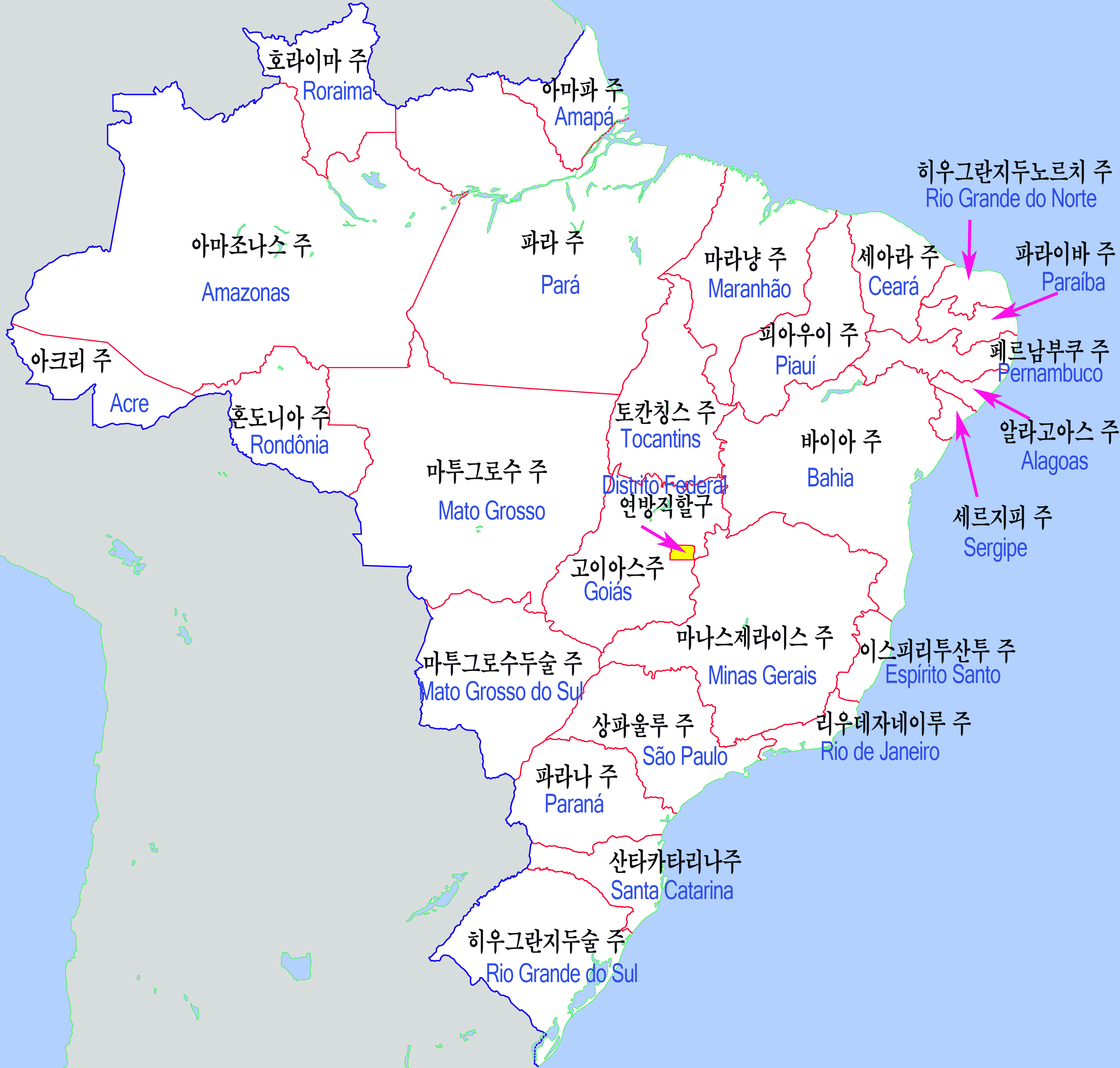 브라질 행정구역